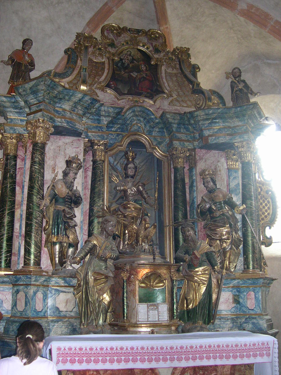 A gelencei Szent Imre-templom (főoltár)– photo taken by uploader User:Csanády in 2006.